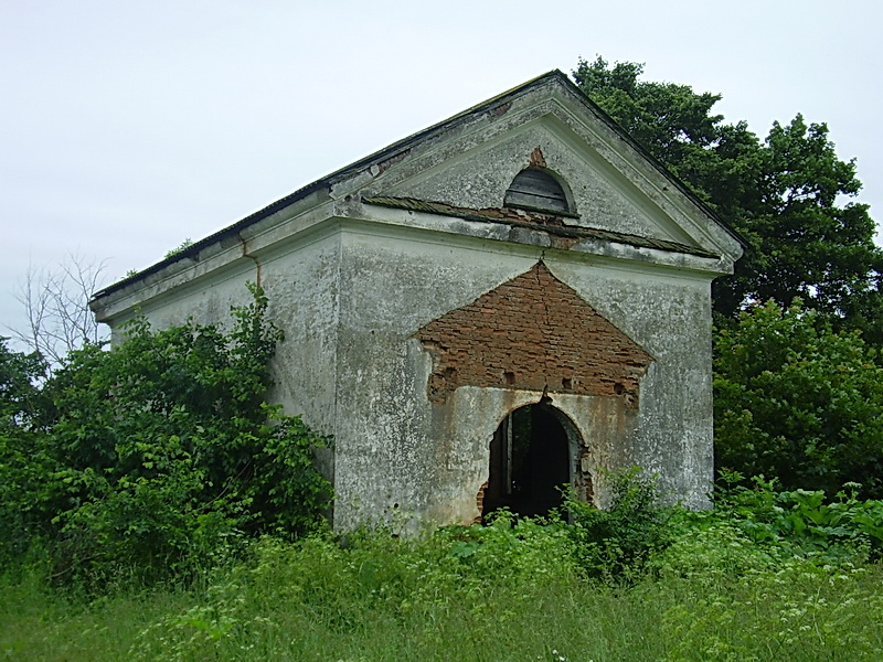 Вусава. Капліца